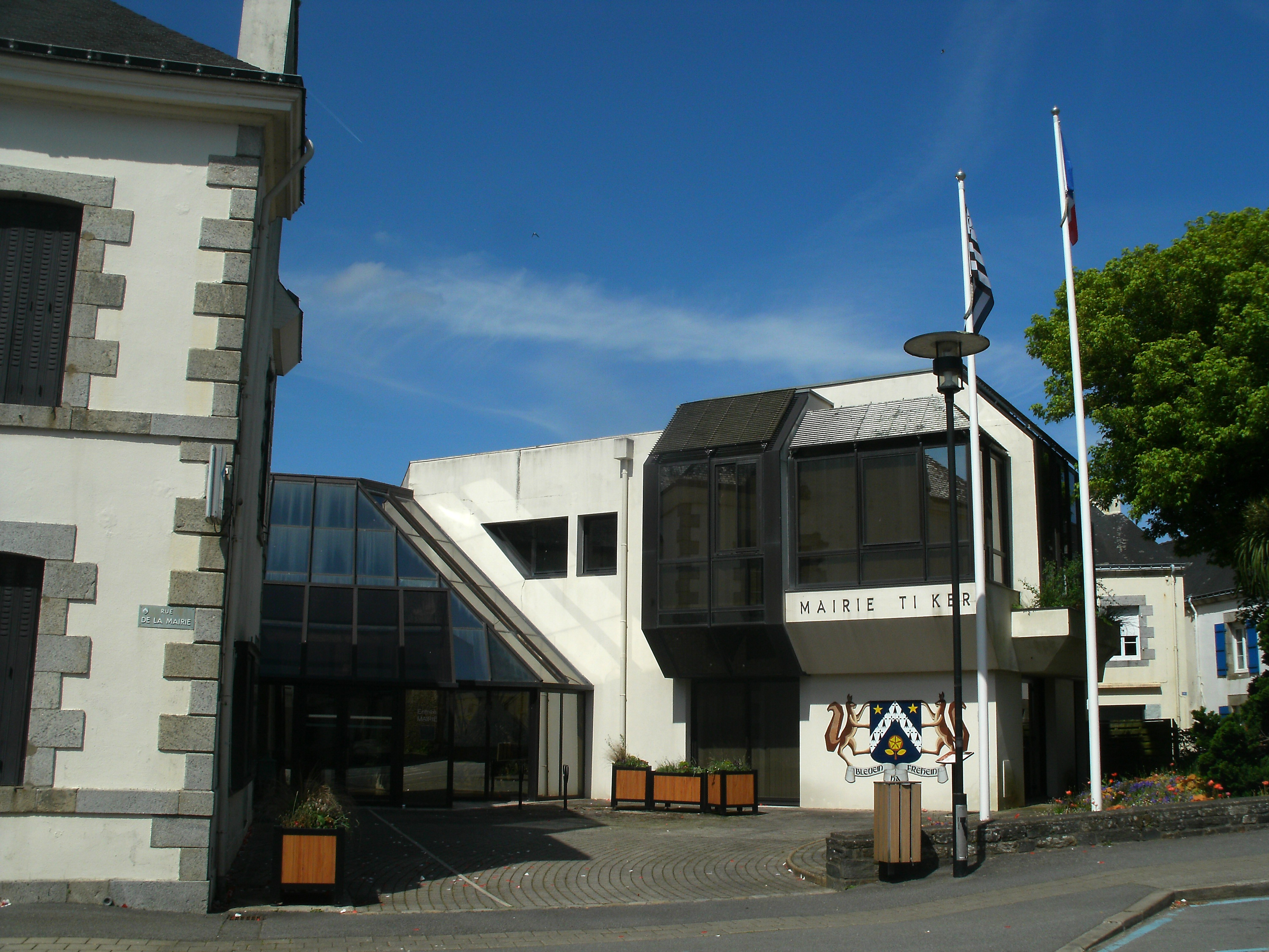 Entrée actuelle de la mairie (1987).